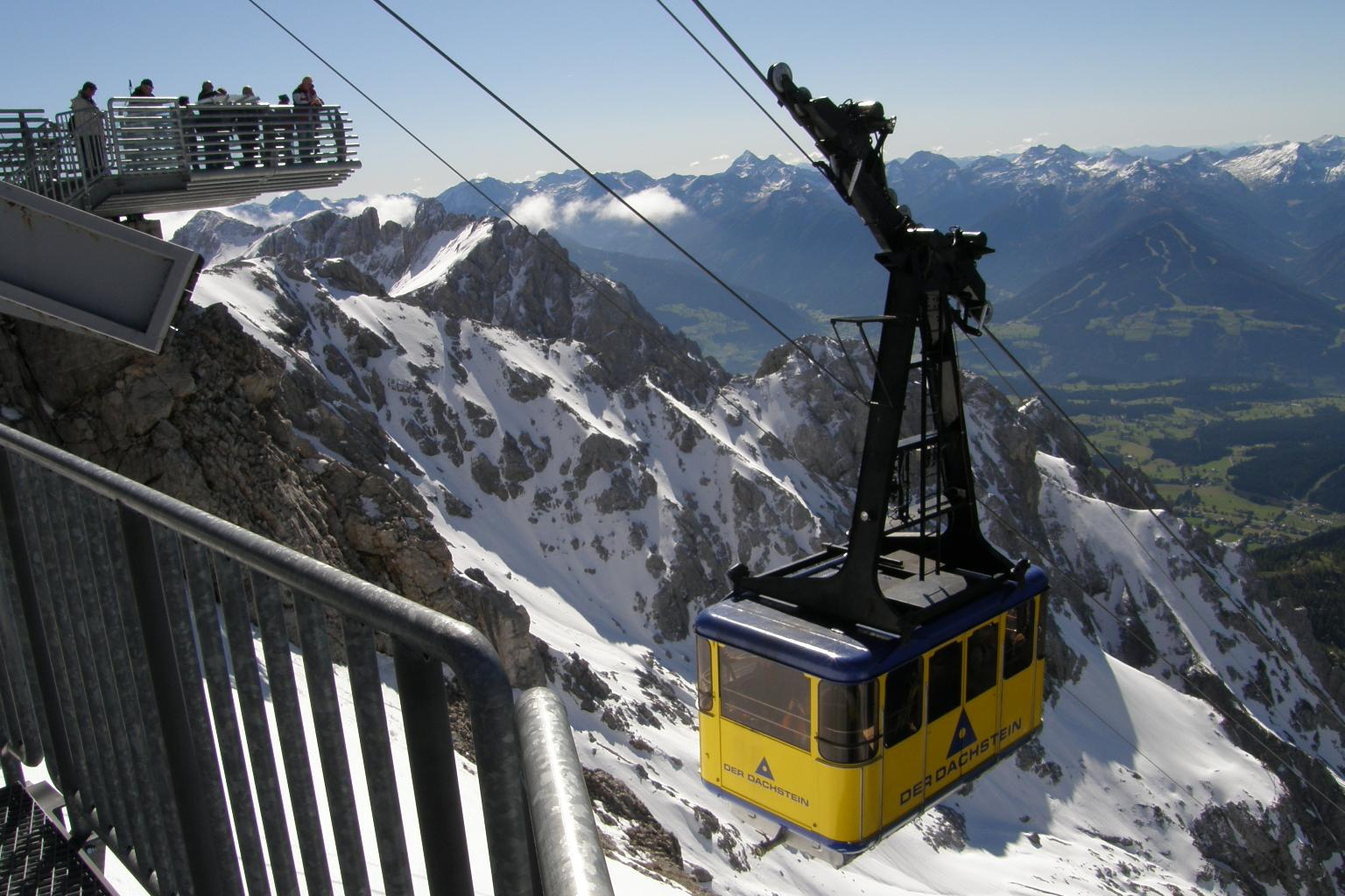 Dachstein Seilbahn